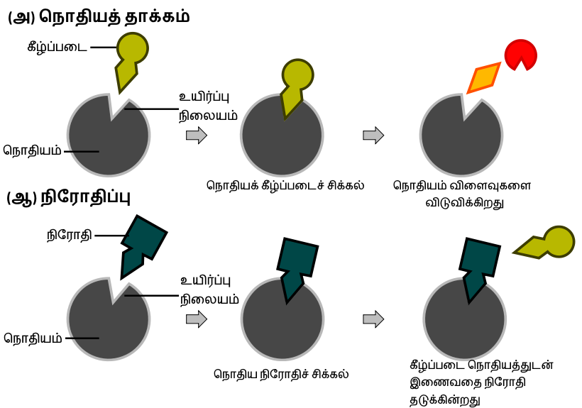 போட்டிக்குரிய நிரோதியின் தொழிற்பாடு.